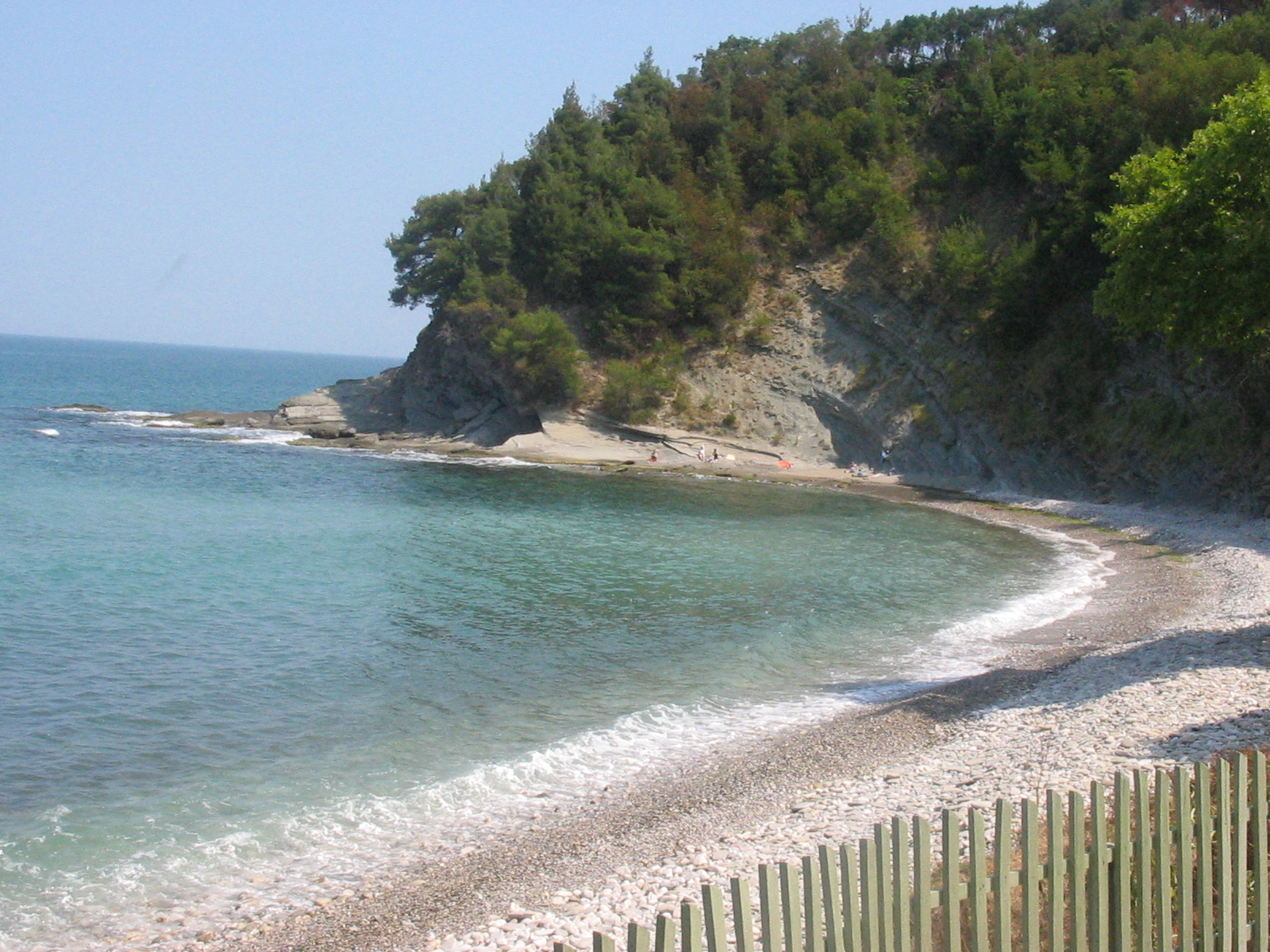 Kuğu Yalısı, Ayancık- a small taste of paradise